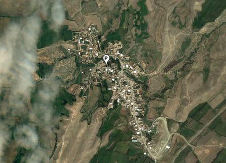 عکس هوایی روستای پورناک